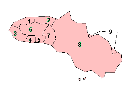 Overzicht van de talen op Soemba (Oost-Nusa Tenggara, Indonesië).